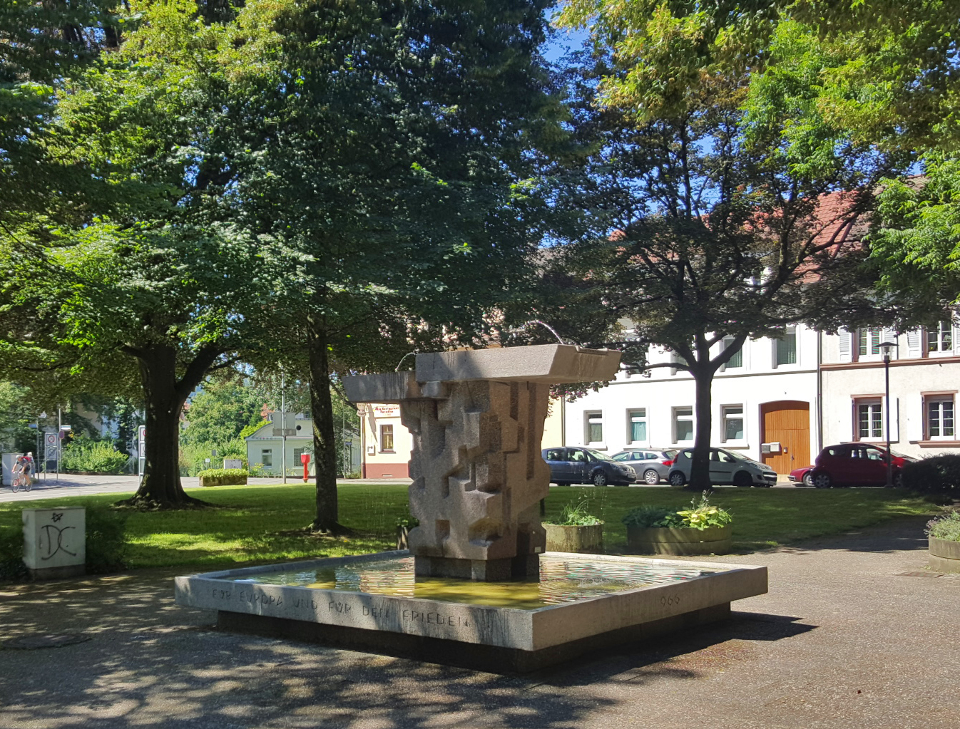 Der Europabrunnen von Hubert Bernhard in der Schlettstadtallee (Waldkirch) wurde in Verbindung mit einem Heimattag am 2. Oktober 1966 der Öffentlichkeit übergeben. Er ist aus Stein vom alten Kaiser-Wilhelm-Denkmal gefertigt. Den Namen von Waldkirchs Partnerstadt Sélestat war anfangs eingemeißelt, im Laufe der Jahre sind die Namen der übrigen Partnerstädte hinzugekommen. Aus Anlass des 50. Jahrestages der Einweihung wurde der Springbrunnen 2016 wieder instand gesetzt.